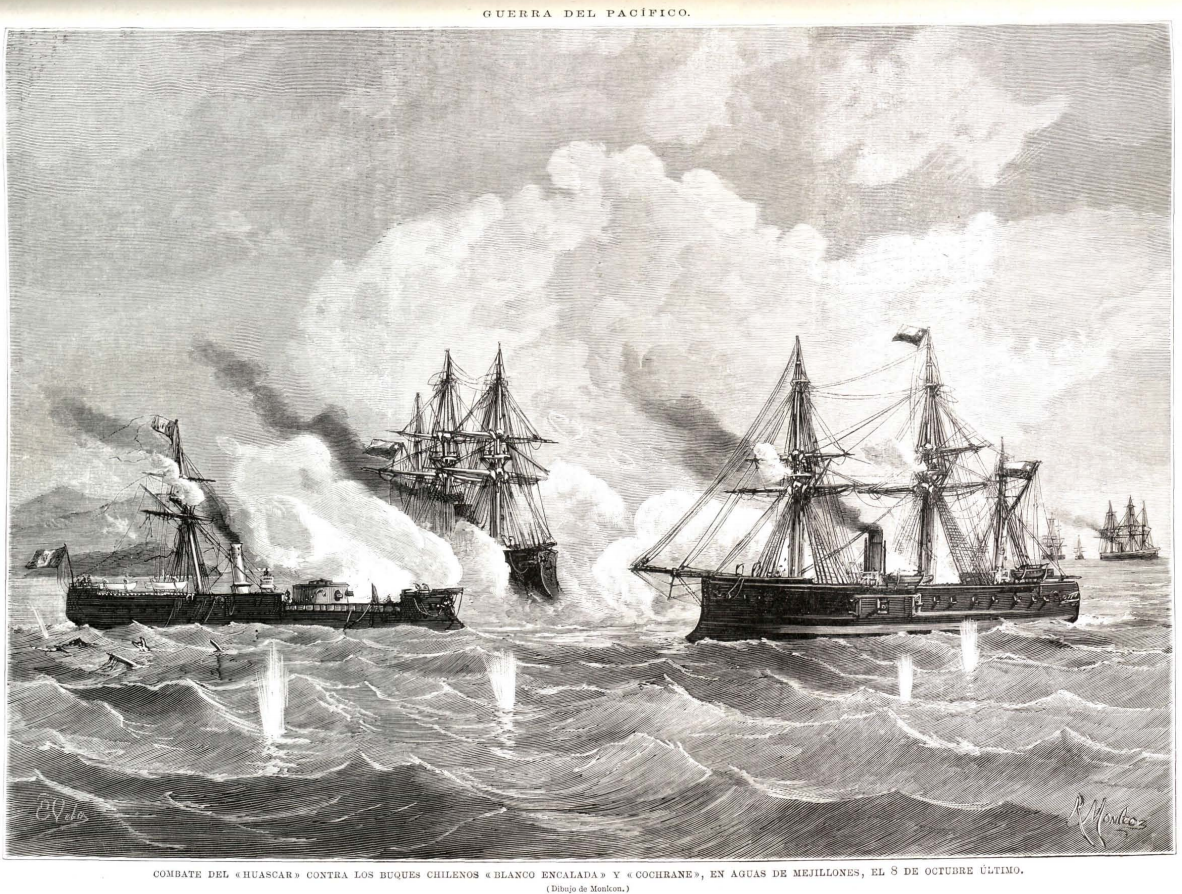 Combate de Angamos